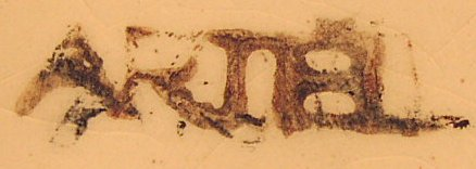 Markenstempel von einer Keramikdose (Entwurf: Pavel Janák), Künstlergenossenschaft Artěl, Prag, um 1920.